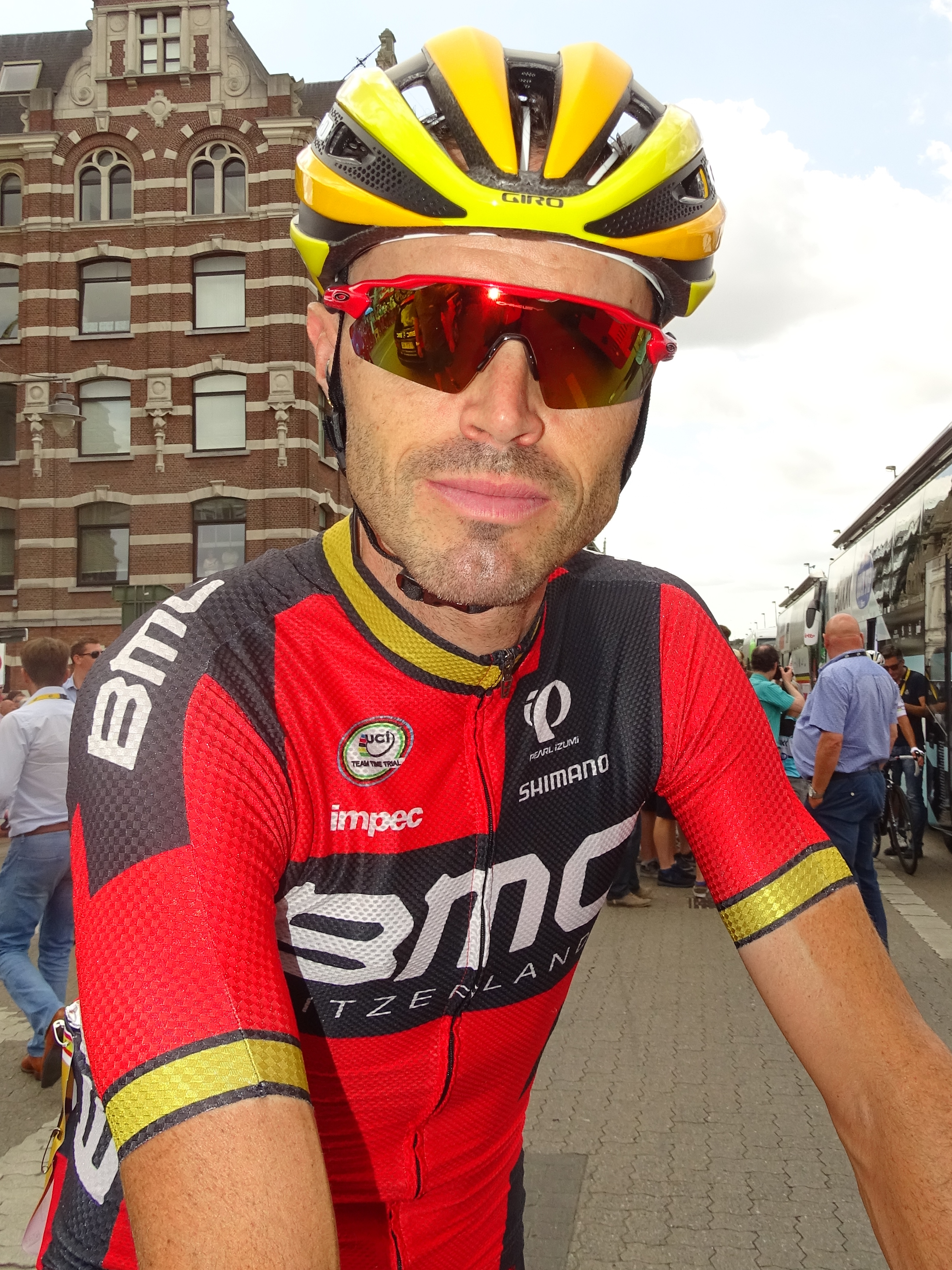 Reportage réalisé le lundi 6 juillet à l'occasion du départ de la troisième étape du Tour de France 2015 à Anvers, Belgique.